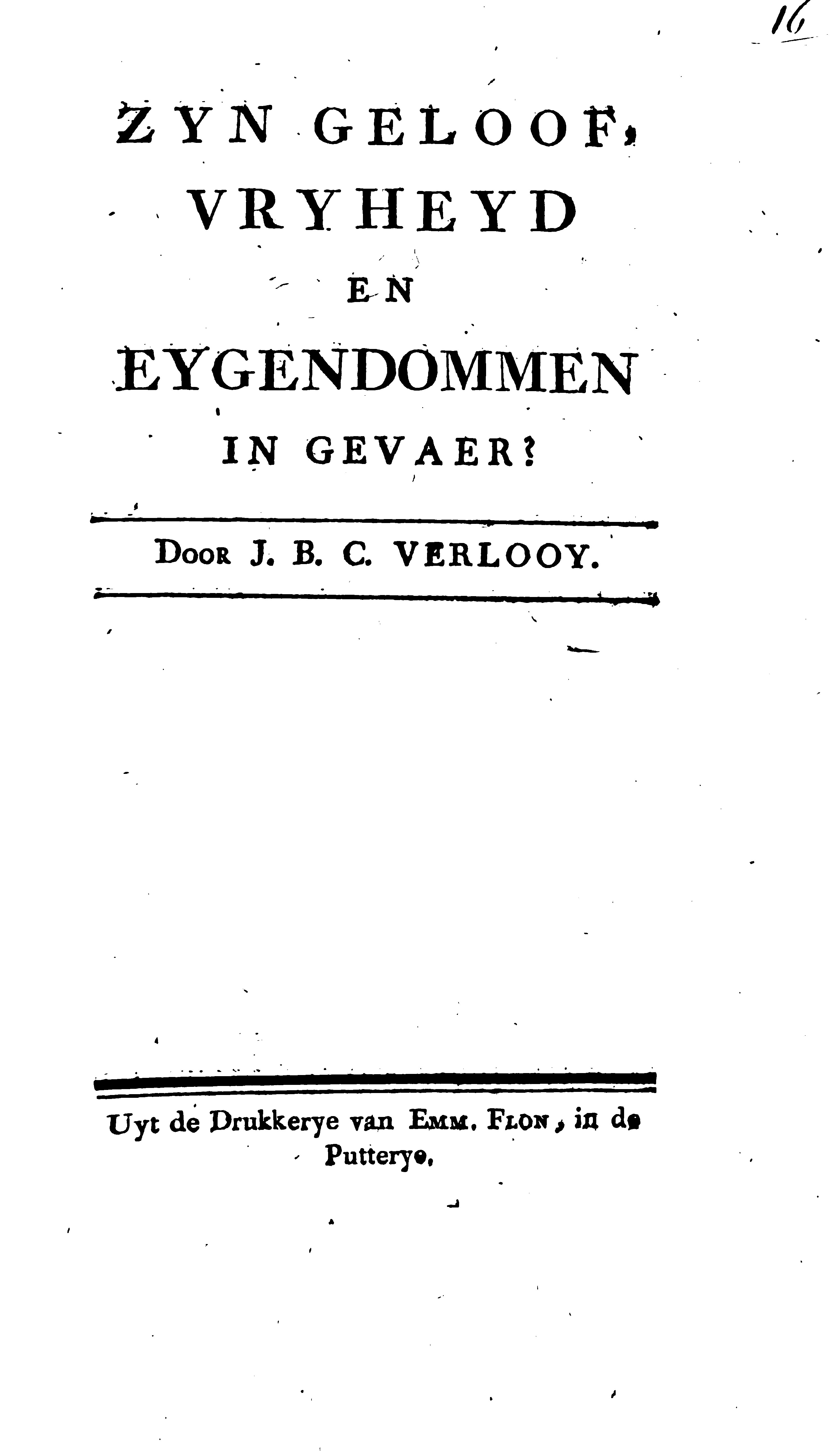 Titelblad van "Zyn geloof, vryheyd en eygendommen in gevaer?" van Jan Baptist Chrysostomus Verlooy, uitgegeven in 1793.